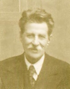 Adolf Gancwol